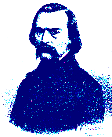 Victor Considerant